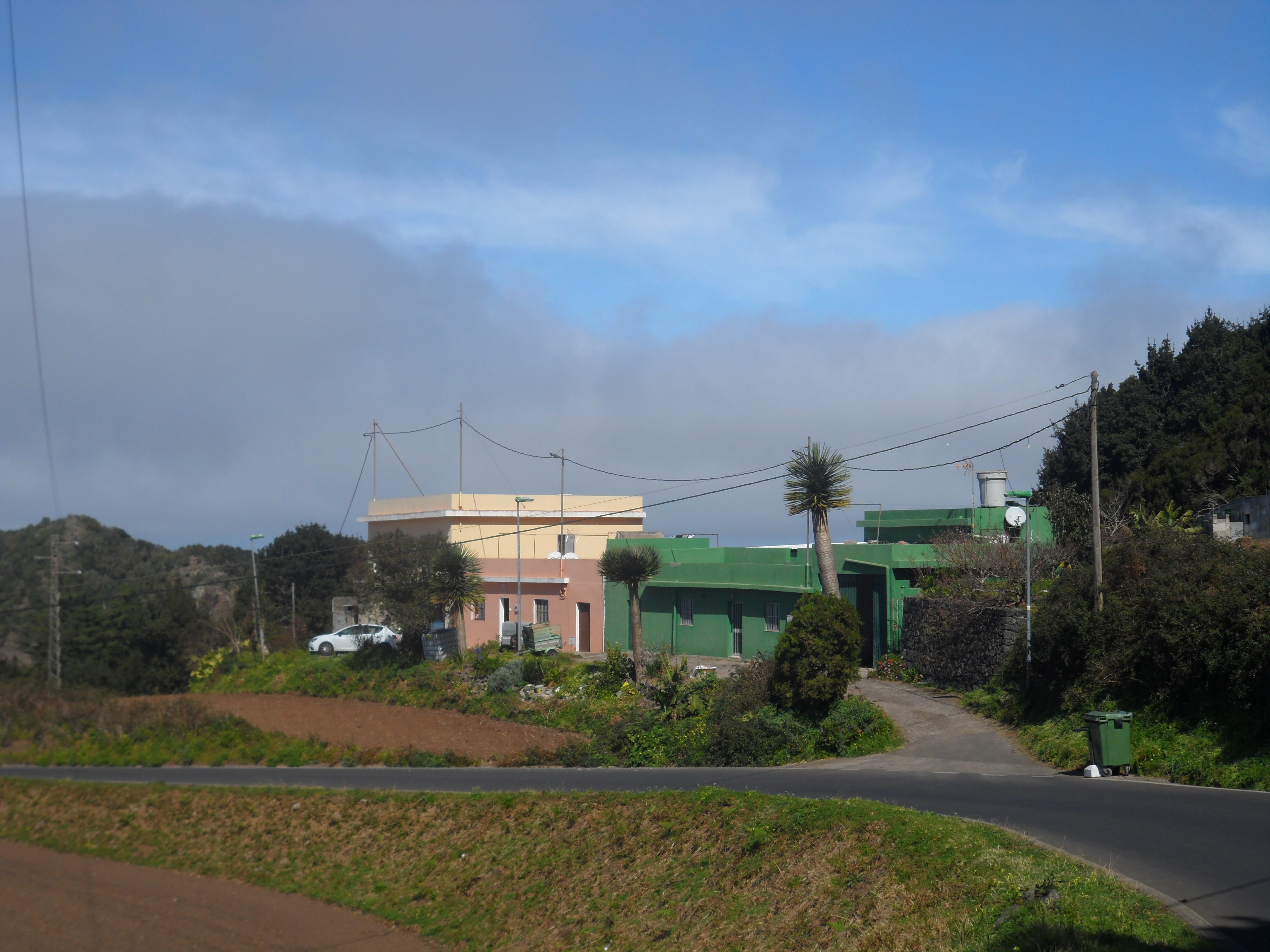 Casas en Cabezo Toro (San Cristóbal de La Laguna)